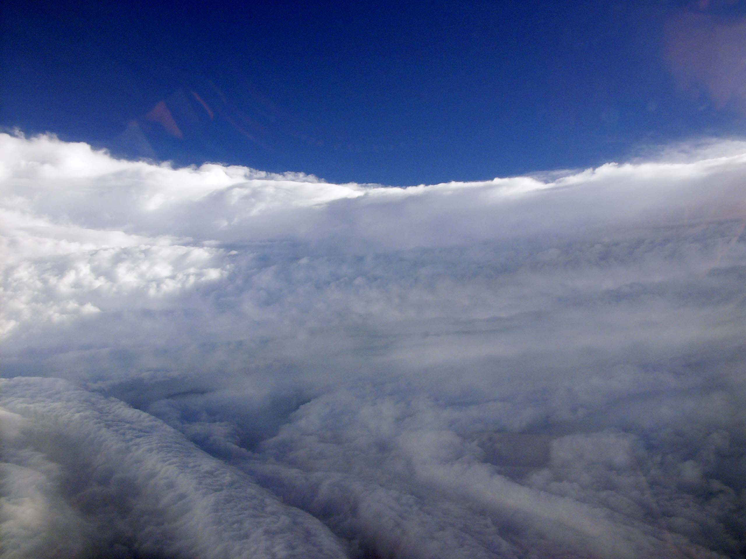 fly00449